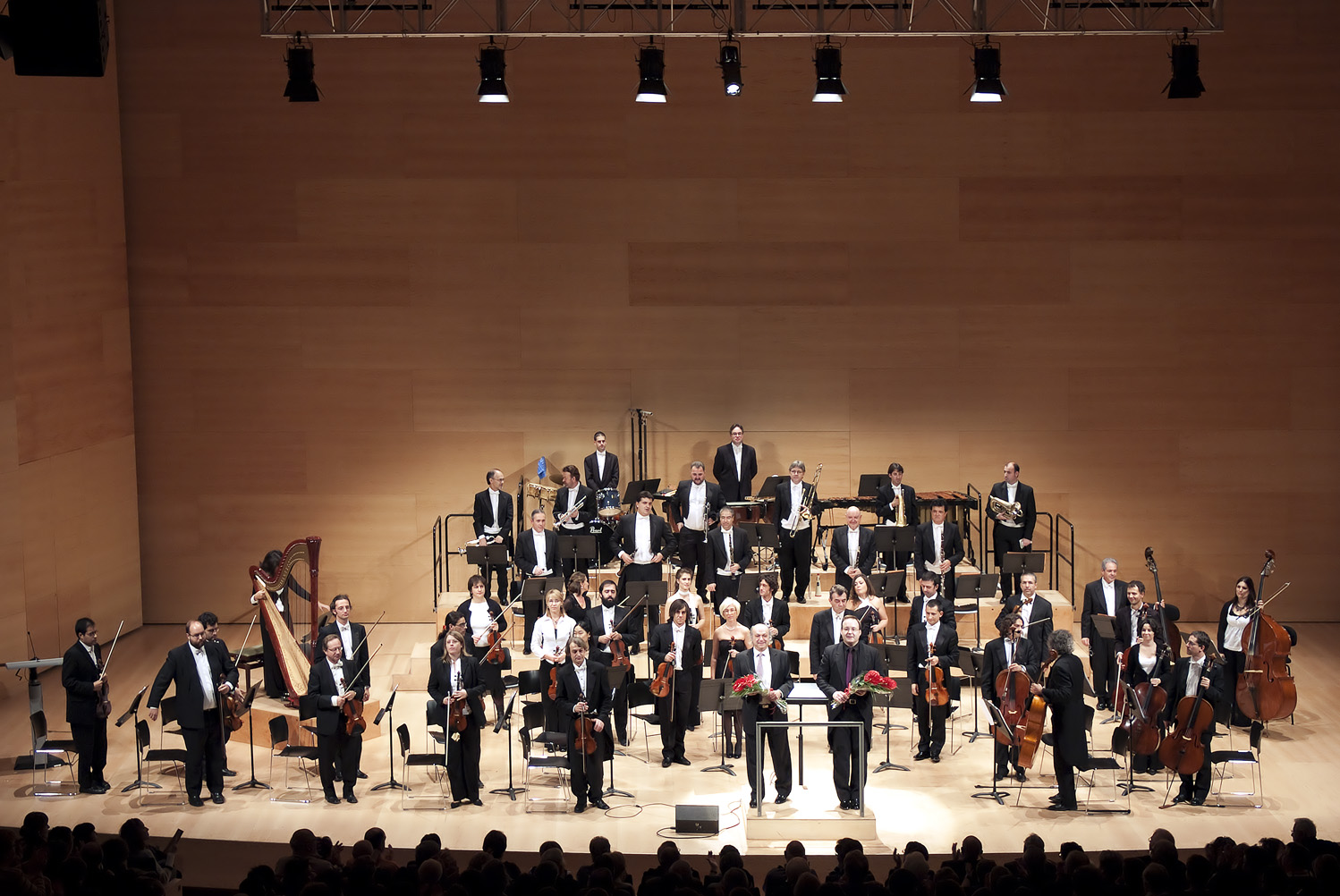 Concert Auditori de Girona novembre 2009.